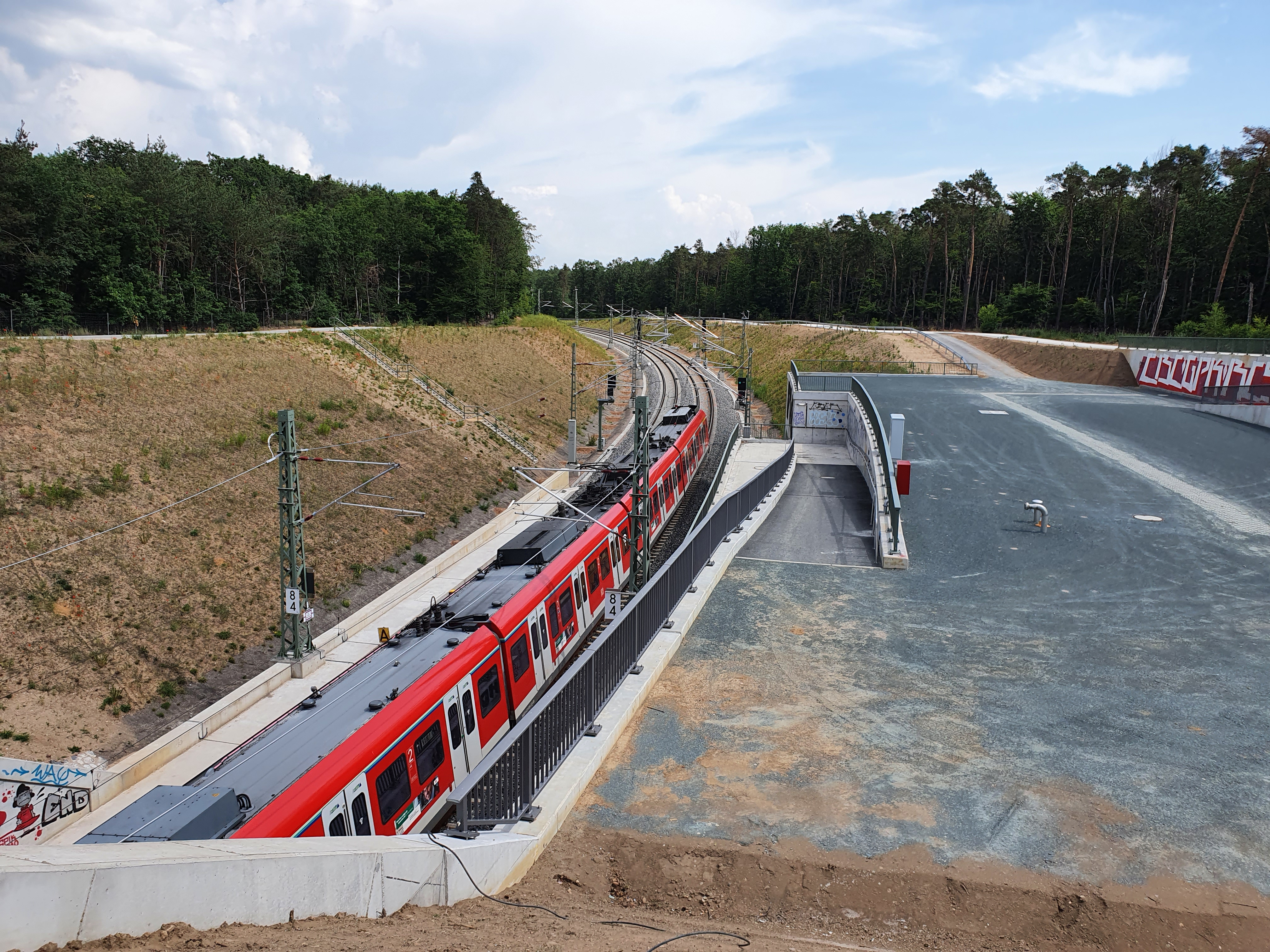 Die neue Flughafenschleife Frankfurt am Tunnelportal zur Station Gateway Gardens.